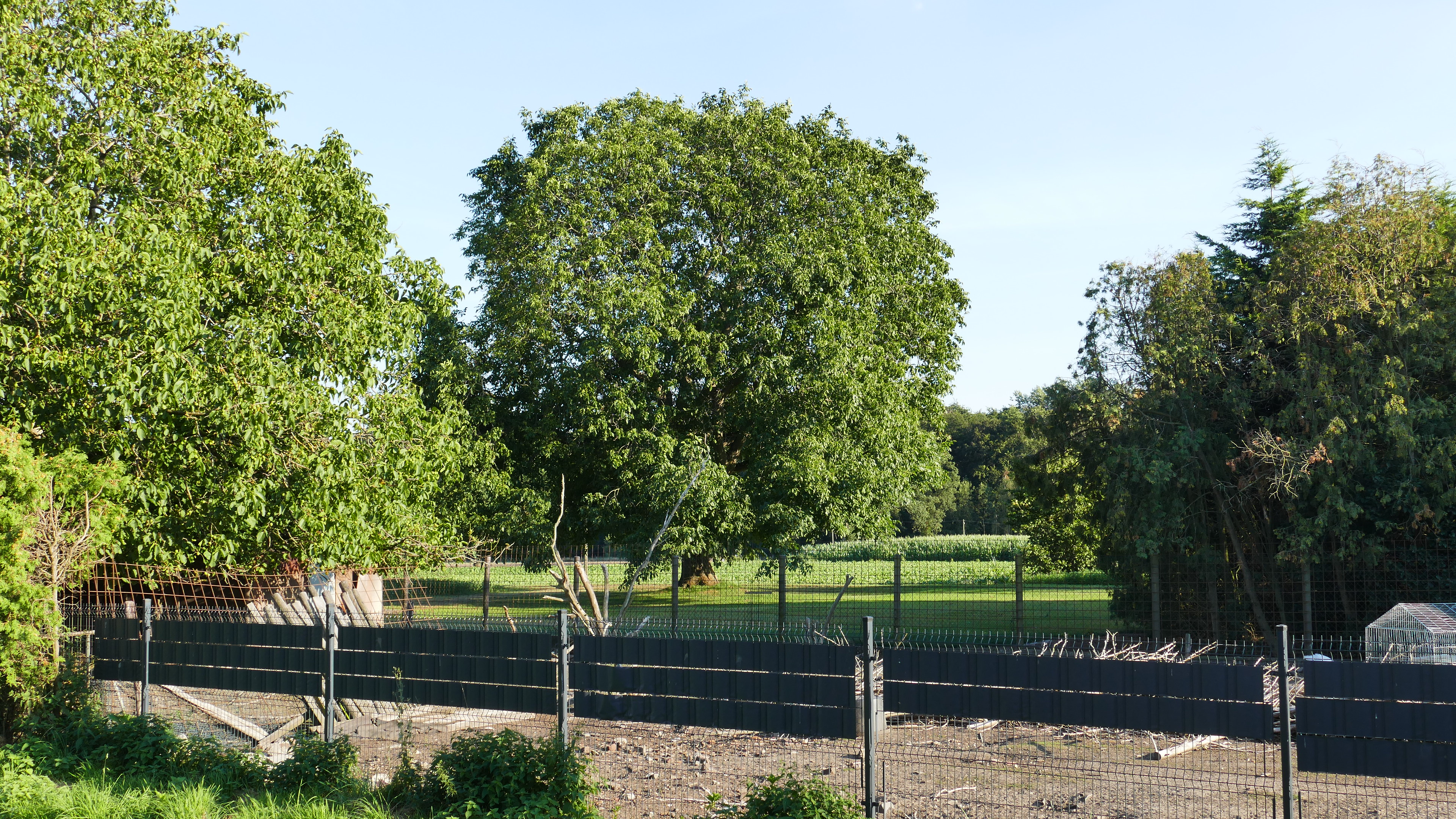 Walnussbaum in Harzbeck Denkmalnummer ND 27 Blick von Norden